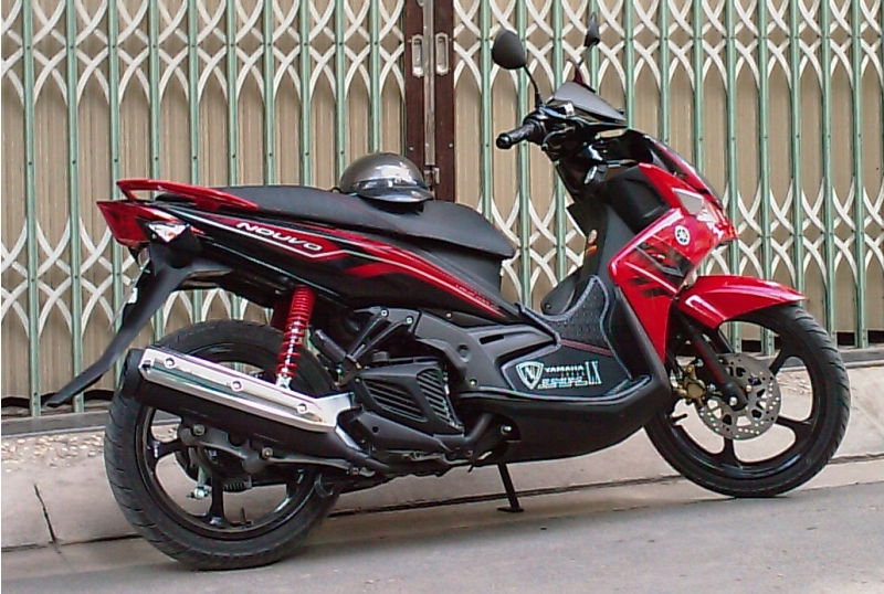 Kevin Miller, Jr., . 2008 Yamaha Nouvo LX-RC